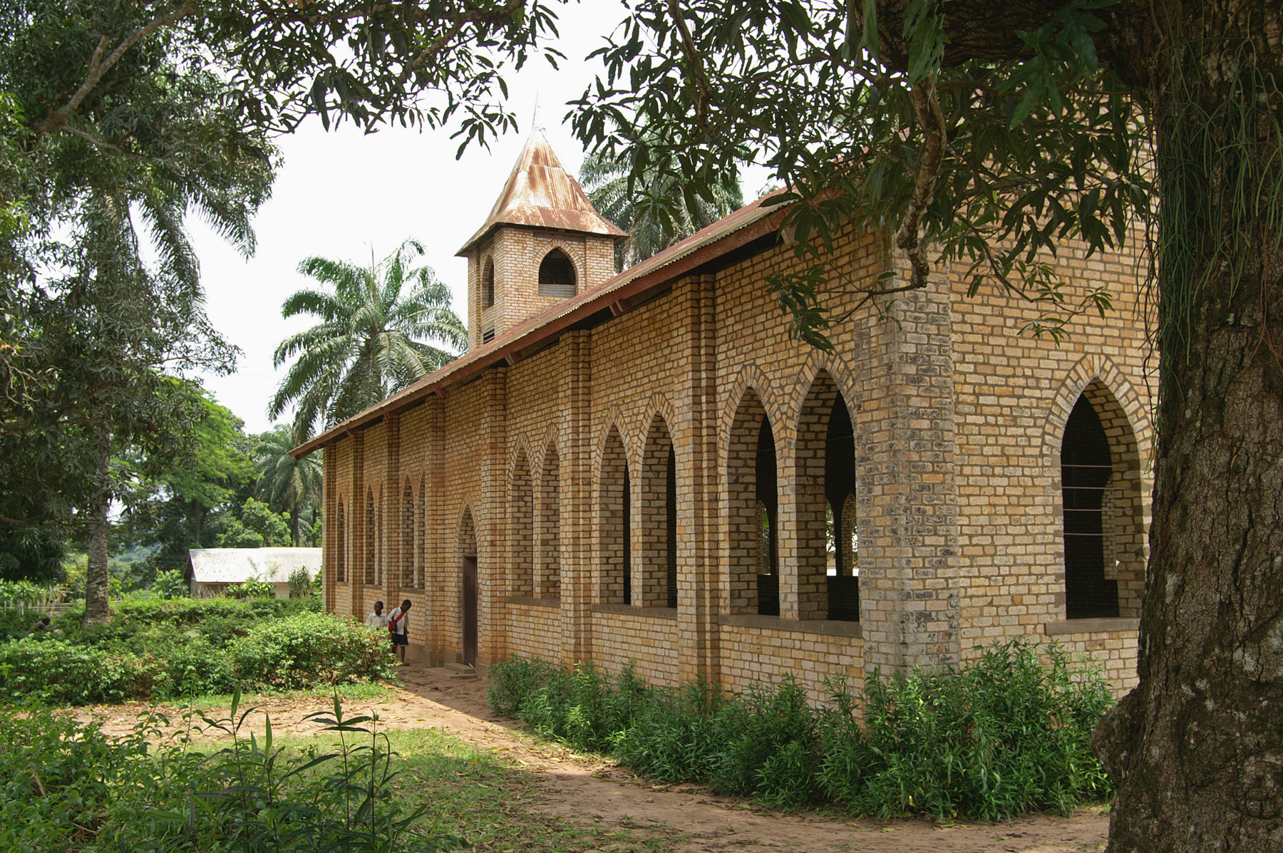 Baptist Church, Vanga, DRC